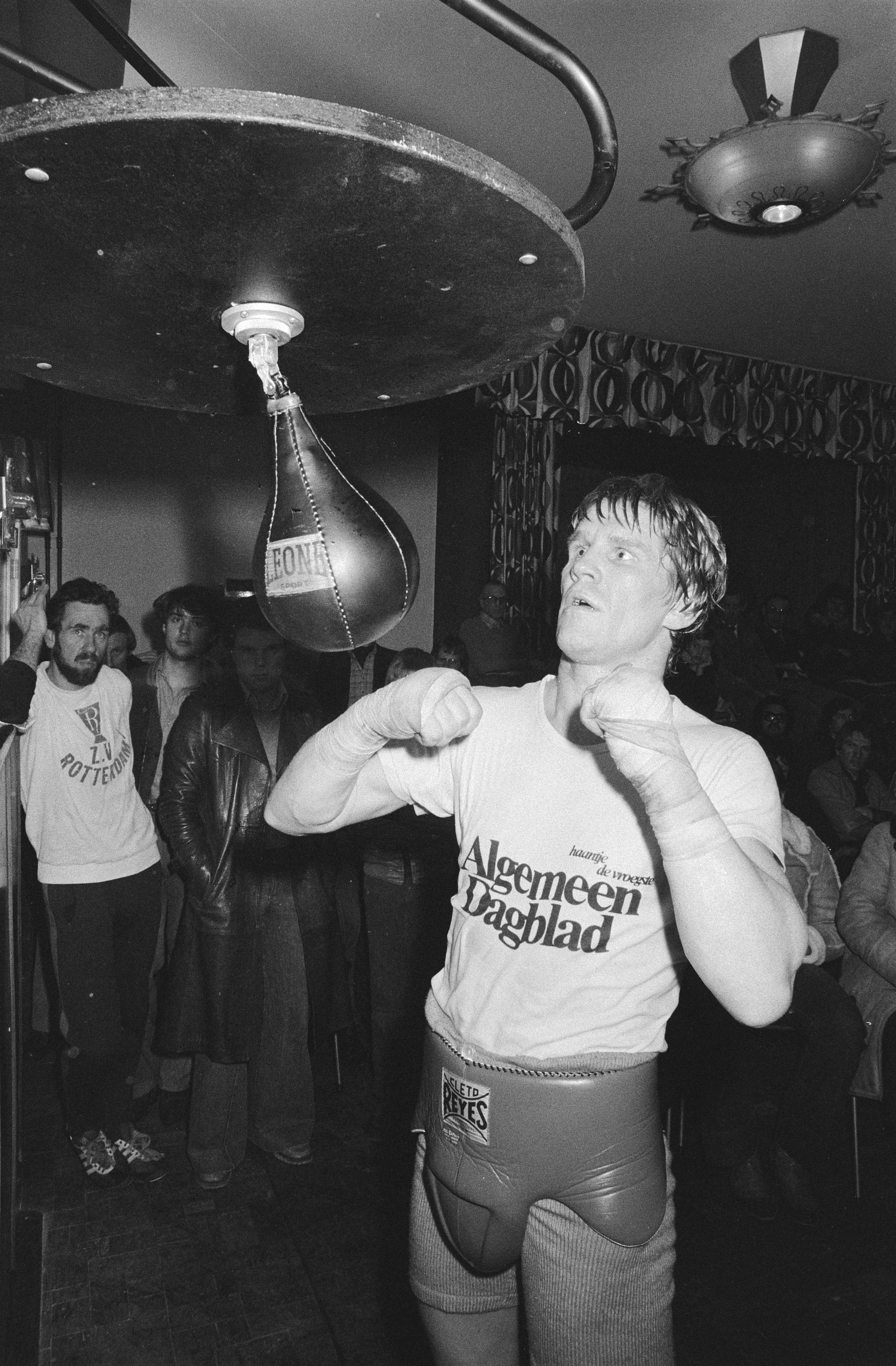 Collectie / Archief : Fotocollectie Anefo Reportage / Serie : [ onbekend ] Beschrijving : Boksen, training Rudi Koopmans in verband met gevecht o Europese titel halfzwaargewicht tegen Aldo Traversaro Datum : 1 februari 1979 Trefwoorden : BOKSEN, TITELS Persoonsnaam : Koopmans, Rudi Fotograaf : Dijk, Hans van / Anefo Auteursrechthebbende : Nationaal Archief Materiaalsoort : Negatief (zwart/wit) Nummer archiefinventaris : bekijk toegang 2.24.01.05 Bestanddeelnummer : 930-0994